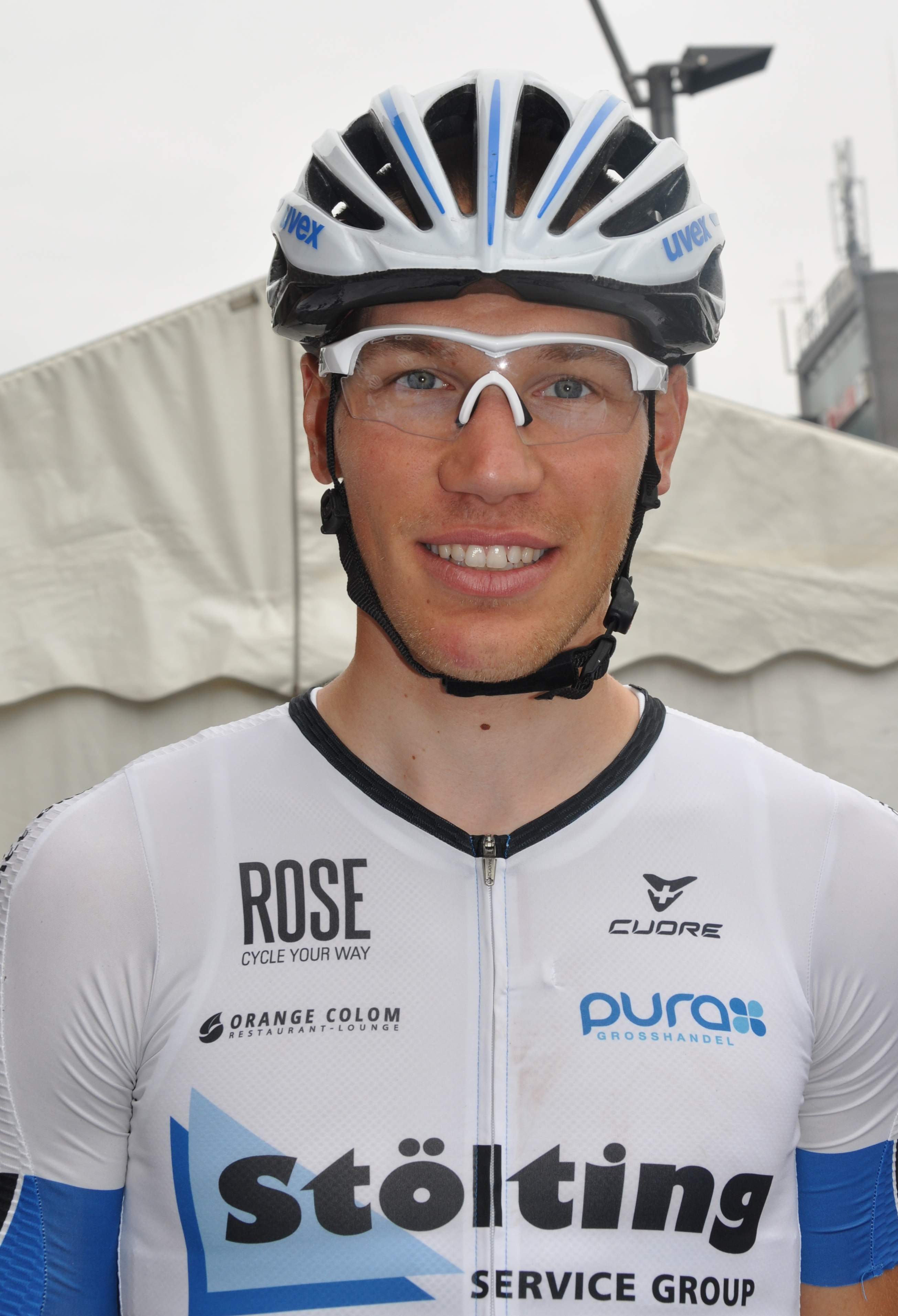 Thomas Koep, deutscher Radrennfahrer